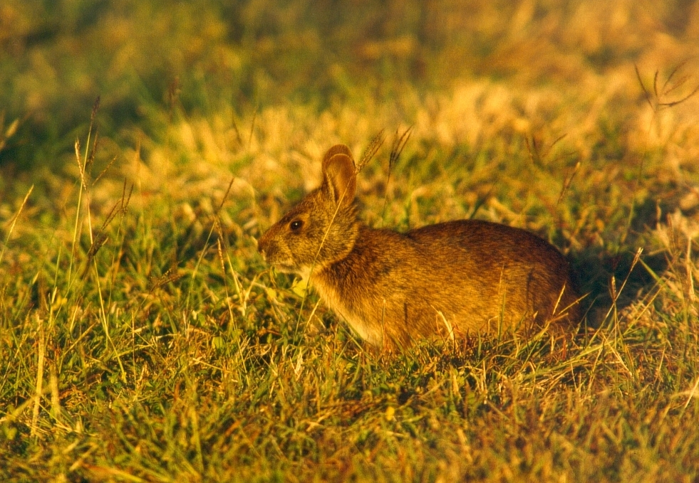 Florida-Waldkaninchen (Sylvilagus floridanus)